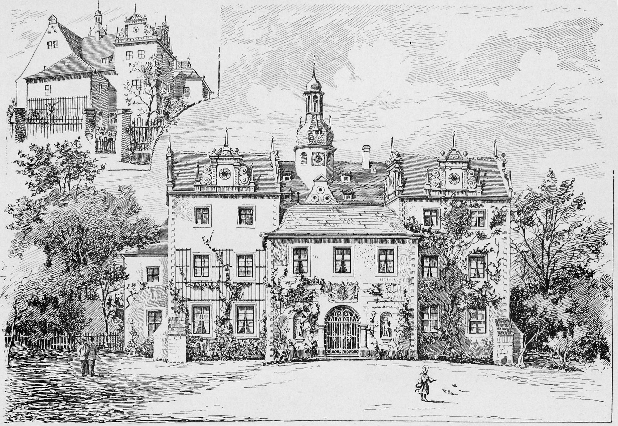 Das Schloss Dölitz zum Ende des 19. Jahrhunderts